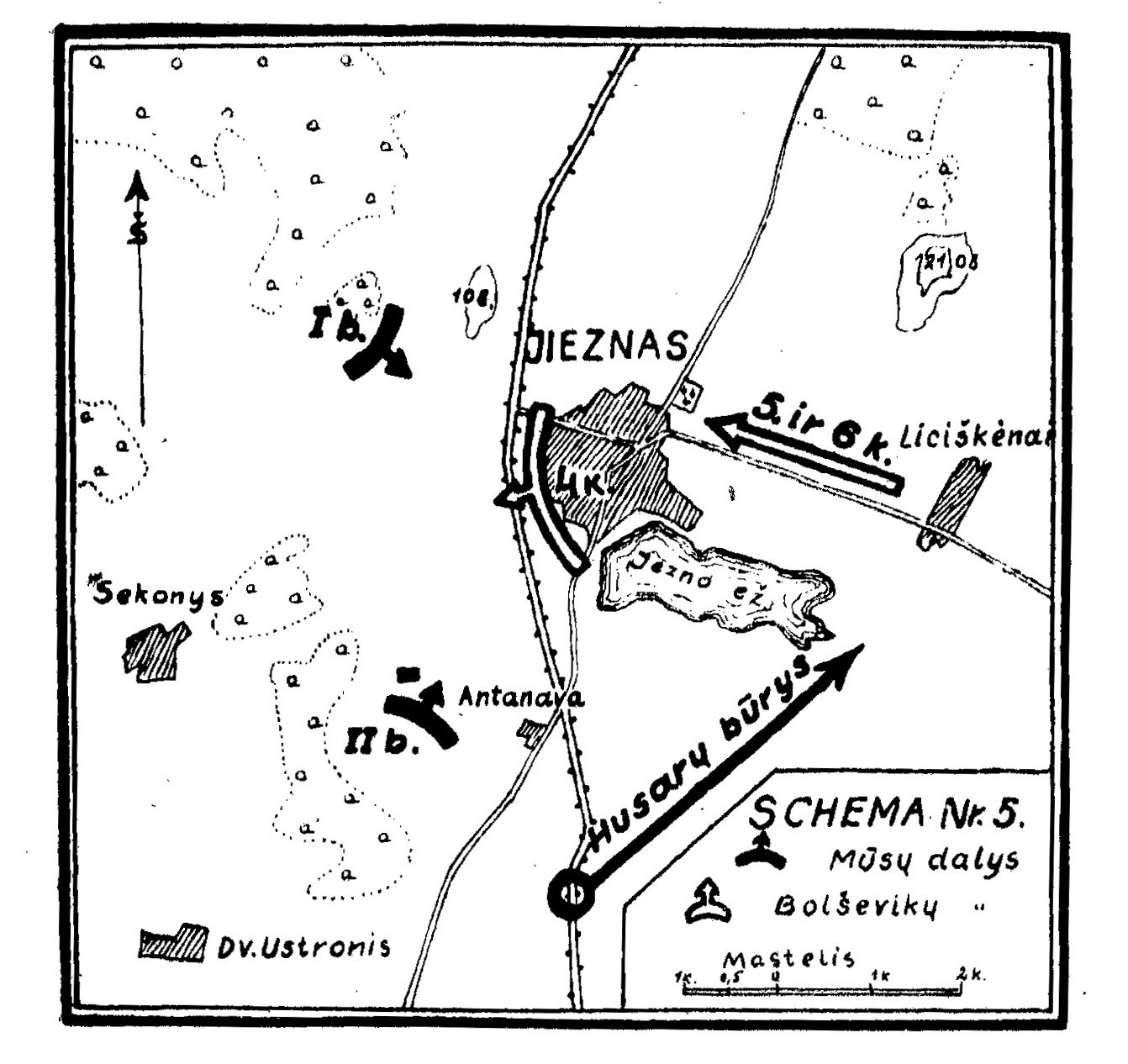 Jiezno kautynių 1919 m. vasario 11 d. schema. Iš K. Ališausko knygos „Pirmieji Nepriklausomybės kovų žygiai“, 1939 m.